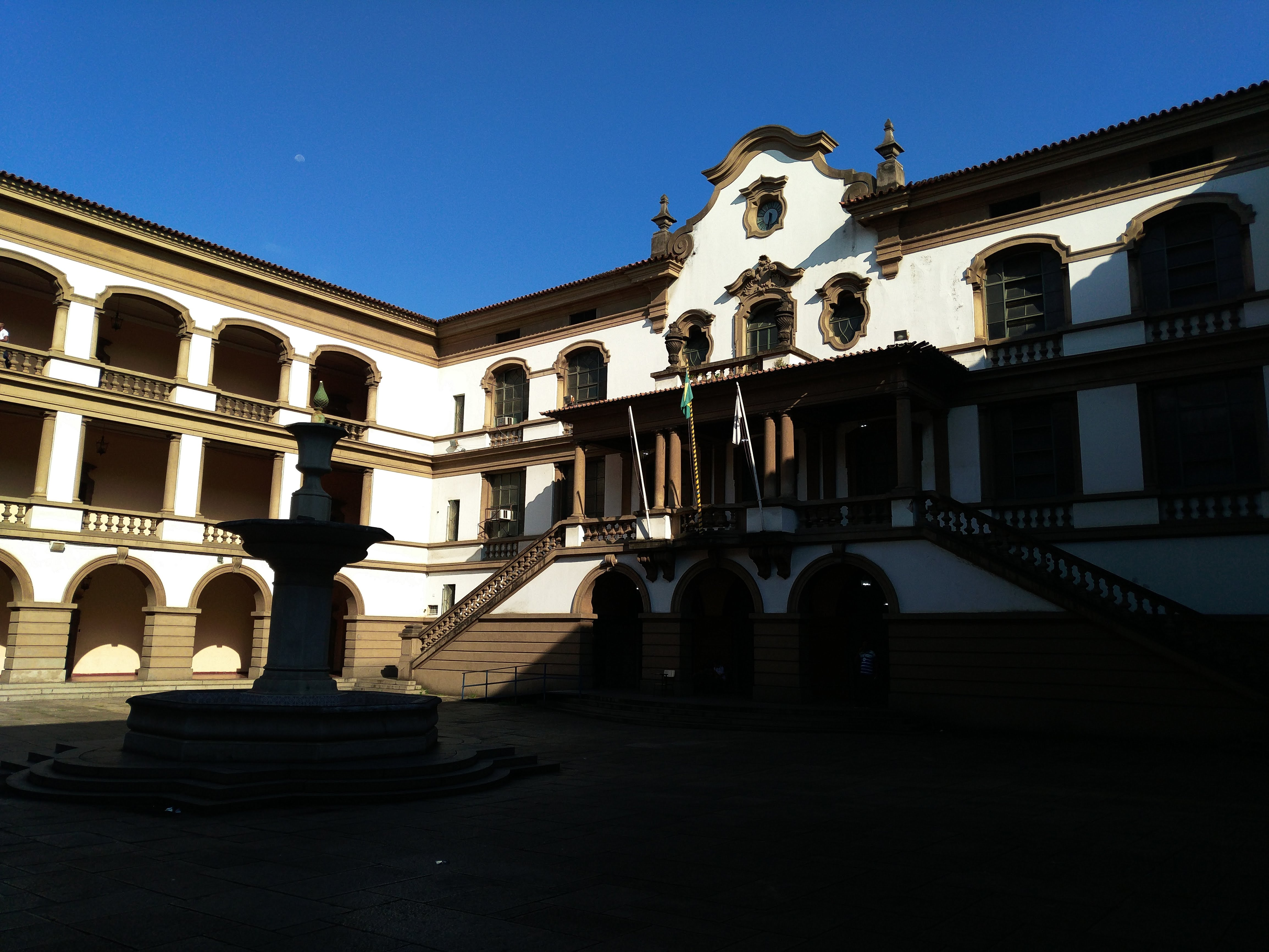 Pátio do prédio central do campus sede do instituto superior de educação do rio de janeiro